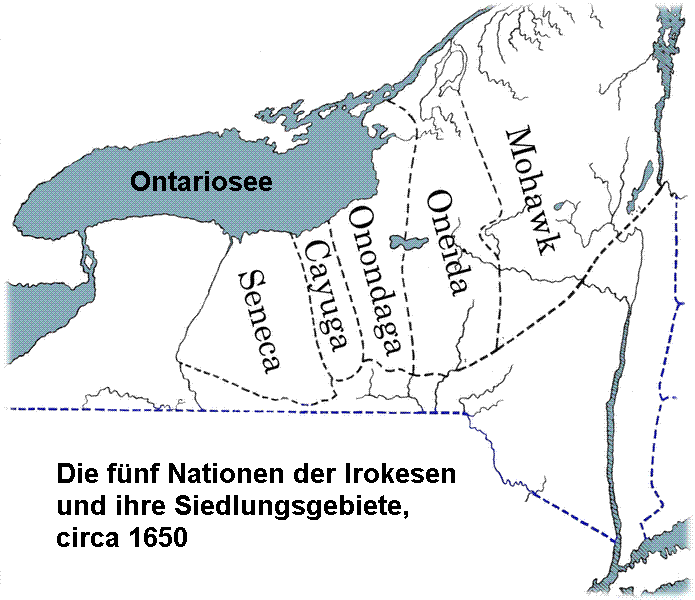 Die fünf irokesen Nationen circa 1650